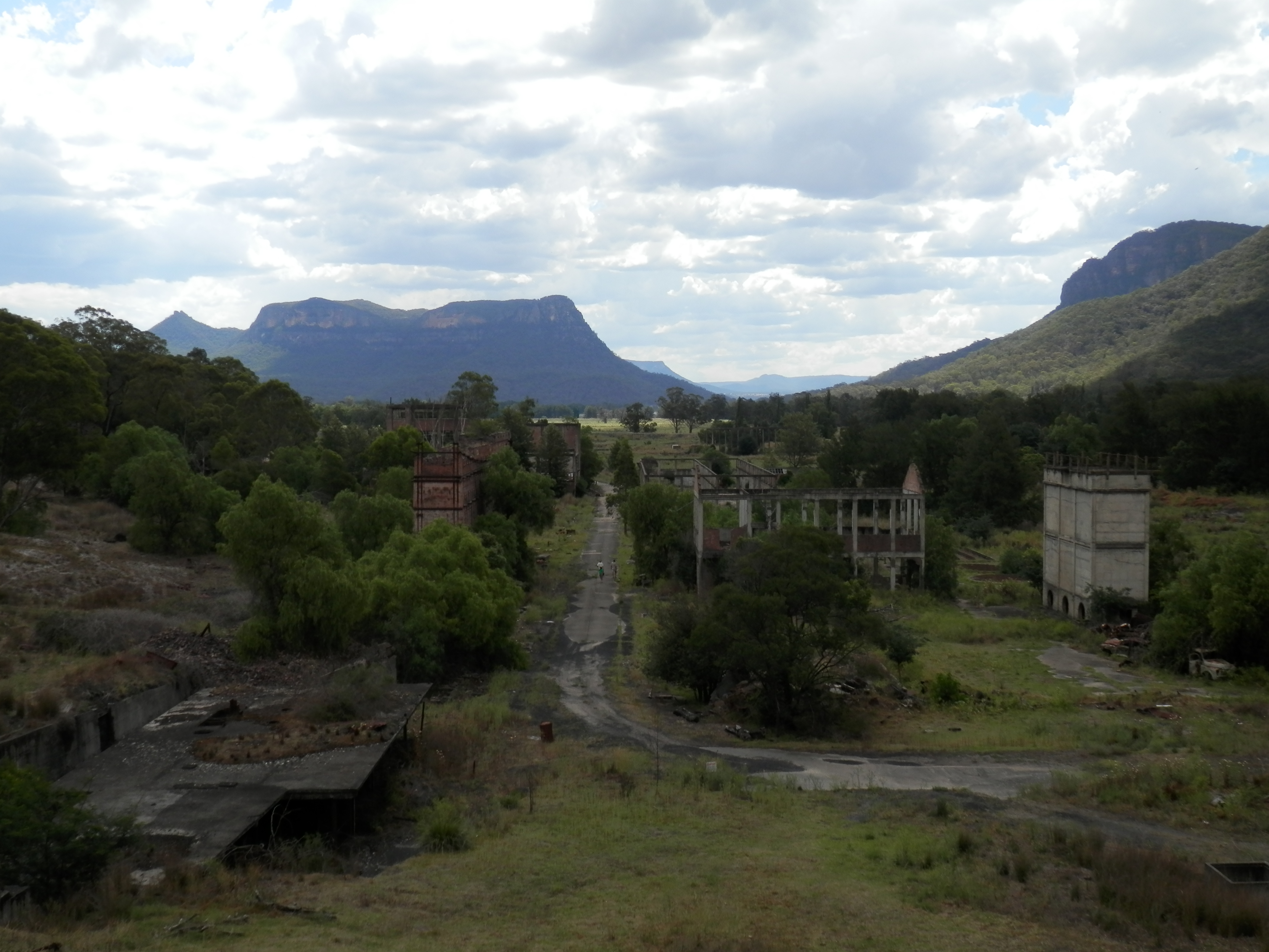 Glen Davis